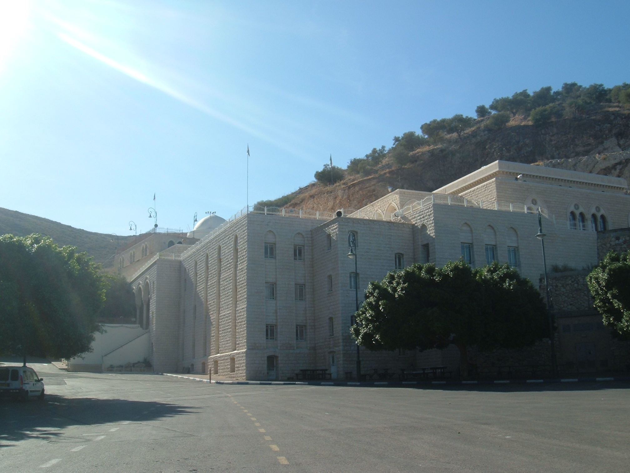 Nebi Shoaib druze holy site in israel. אתר נבי שועייב הקדוש לדרוזים בישראל